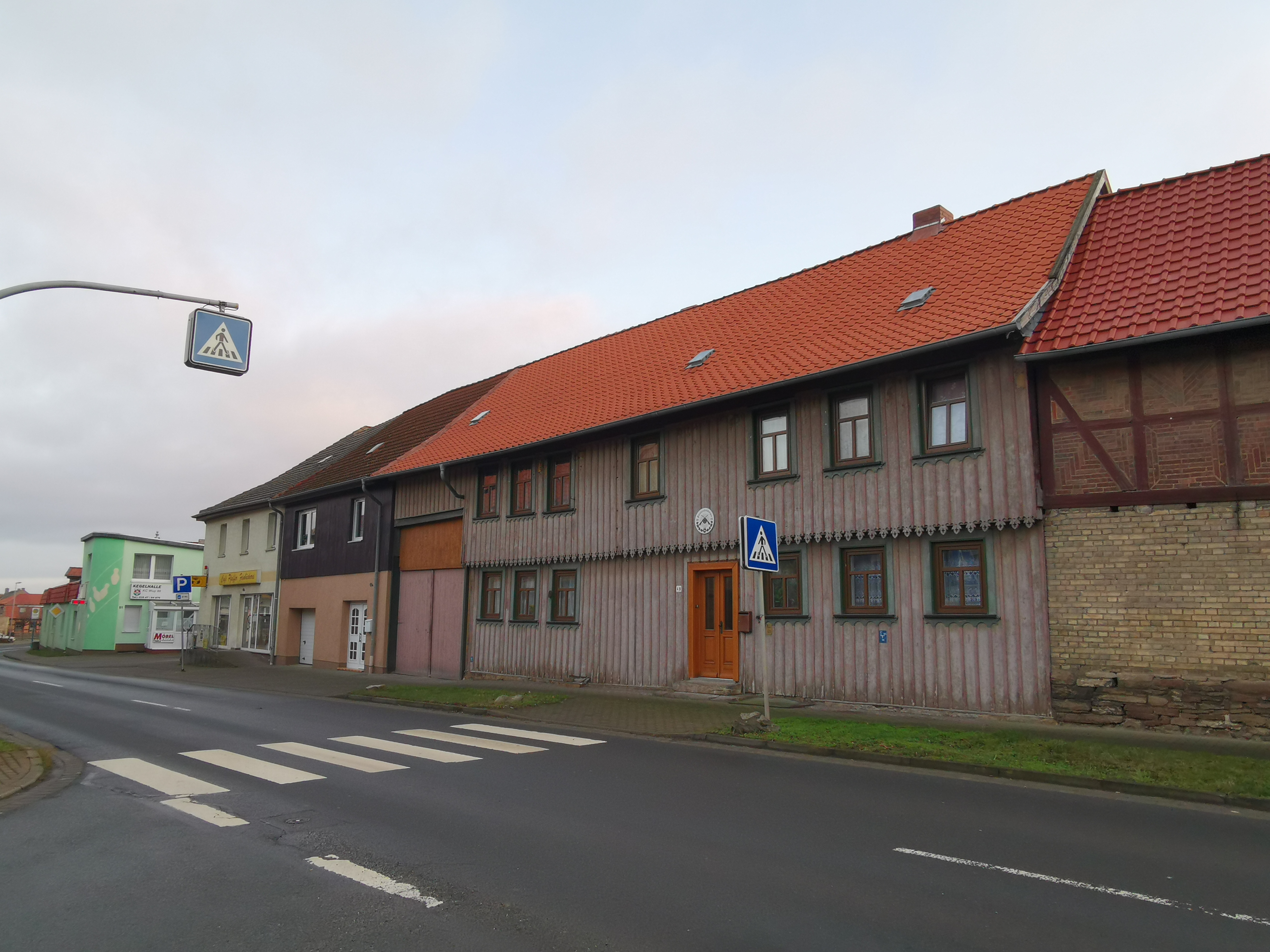 Blankenburger Straße 49 in Timmenrode